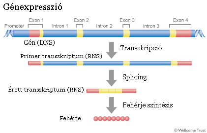 Génexpresszió